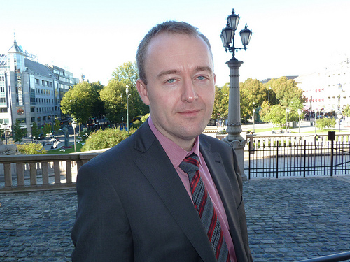 Eirik Sivertsen